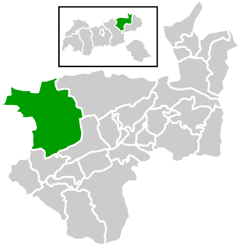 Lage der Gemeinde innerhalb des Bezirks Kufstein